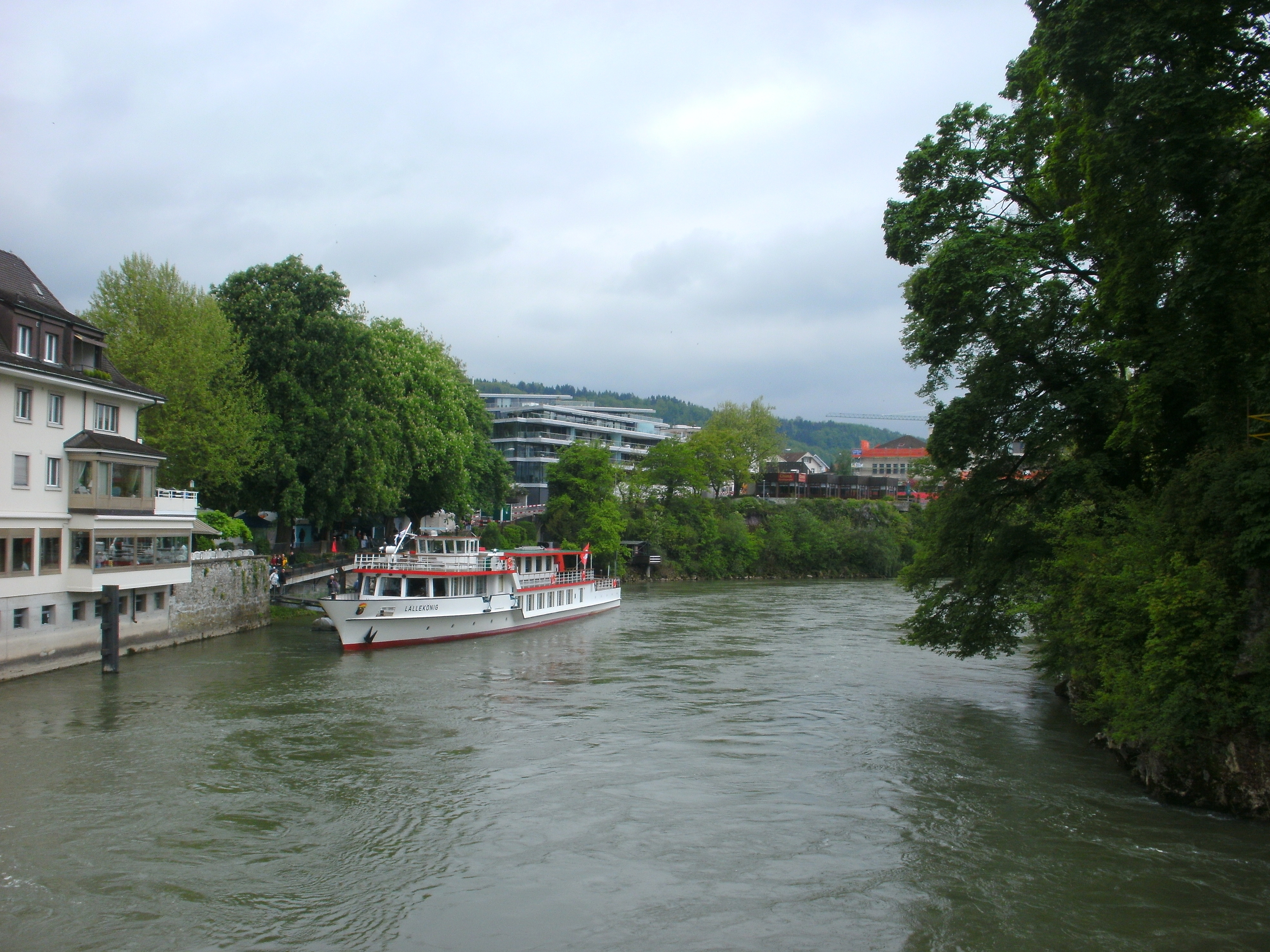 Rheinfelden AG: Die Bootsanlegestelle an der „Fröschweid“ auf Höhe des „Inseli“ (rechts am Bildrand), von der alten Rheinbrücke aus fotografiert. An dieser Stelle endet die Großschifffahrt auf dem Rhein. Der aus Basel kommende Ausflugsdampfer "MS Lällekönig"[1] der Basler Personenschifffahrt AG ist benannt nach dem Basler Wahrzeichen Lällenkönig.